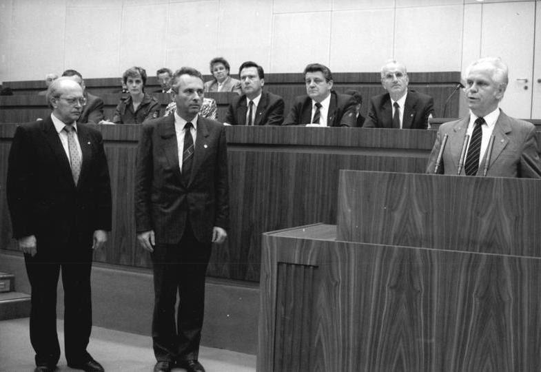 ADN-ZB Mittelstädt 17.11.89 - Berlin: 12. Tagung Volkskammer Die Volkskammer wählte auf Antrag der NDPD Prof. Dr. Manfred Mühlmann (Mitte) zum Stellvertreter des Vorsitzenden des Staatsrates der DDR. Auf Antrag der LDPD wurde der Jurist Gerhard Lindner (l.) zum Mitglied des Staatsrates gewählt. (r.: Volkskammerpräsident Dr. Günther Maleuda).